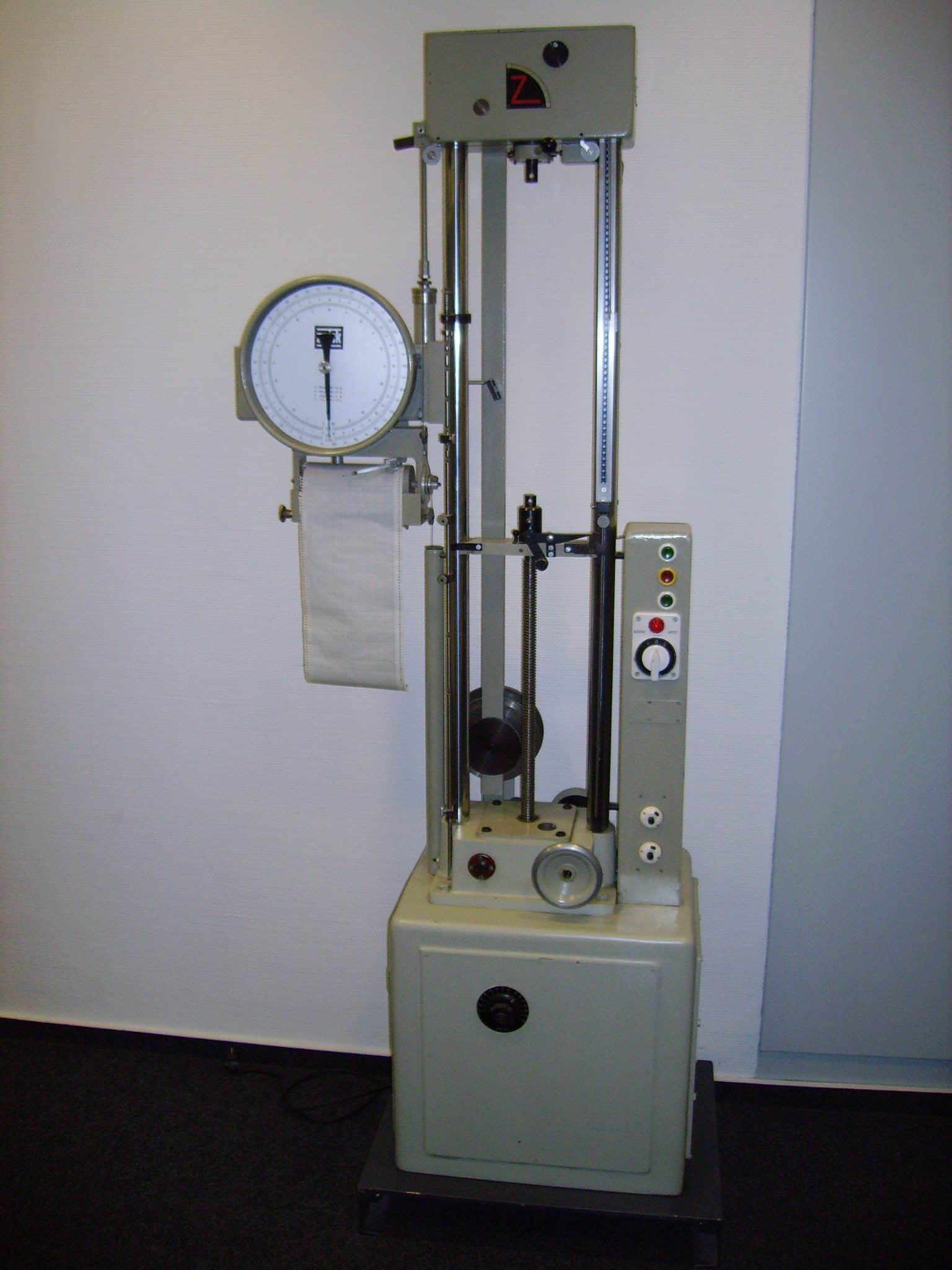 Zugprüfmaschine 1963 --TyborBe1 08:01, 4. Jun 2006 (CEST)